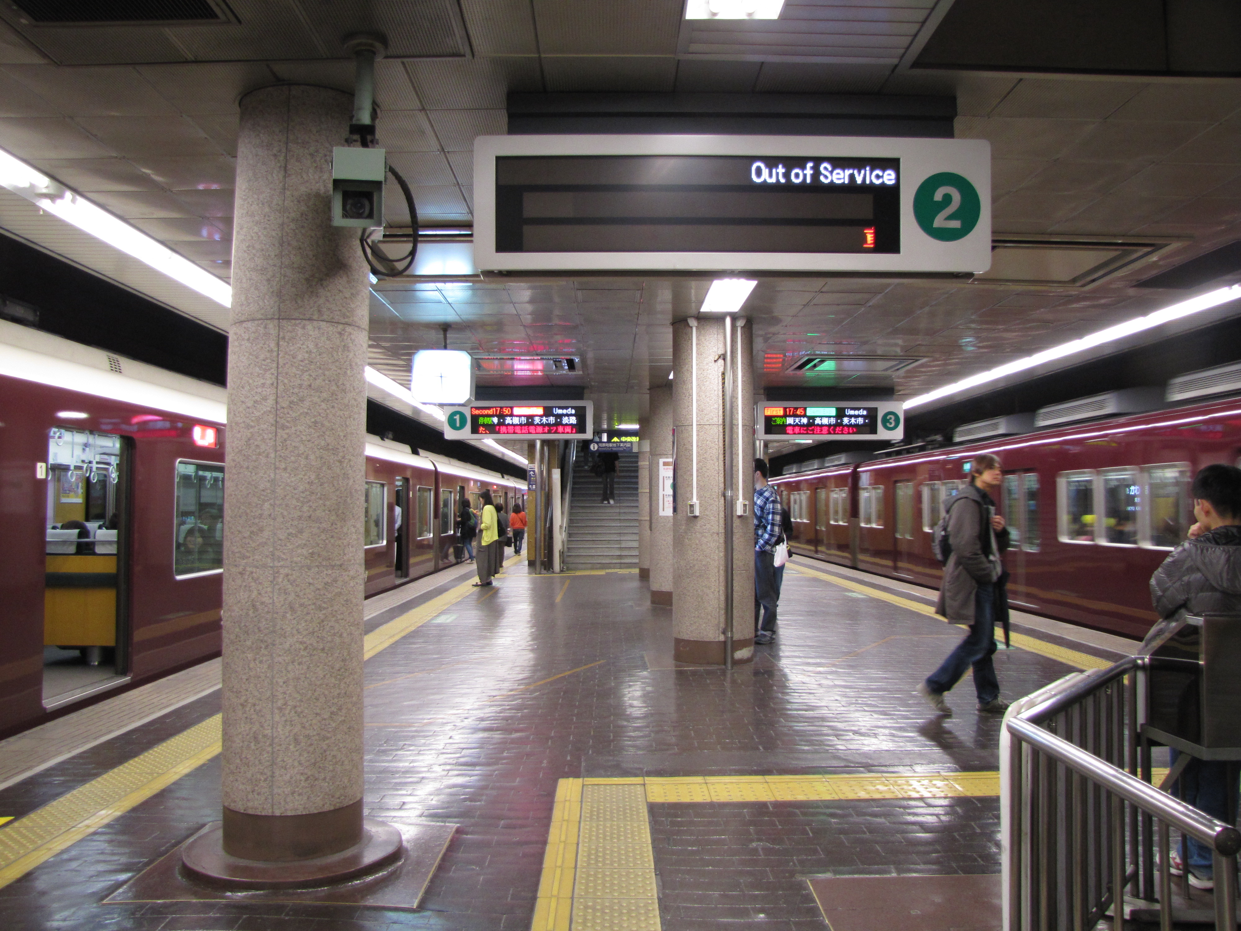 阪急電鉄河原町駅 ホーム